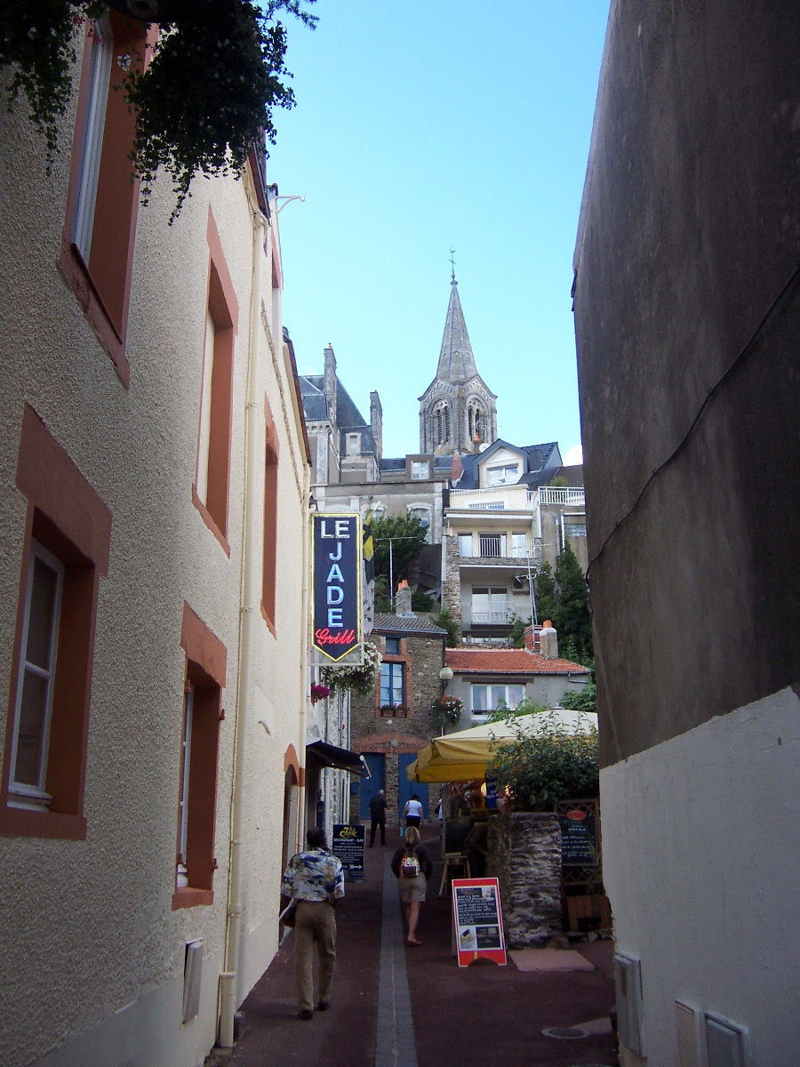 Petite rue de Pornic